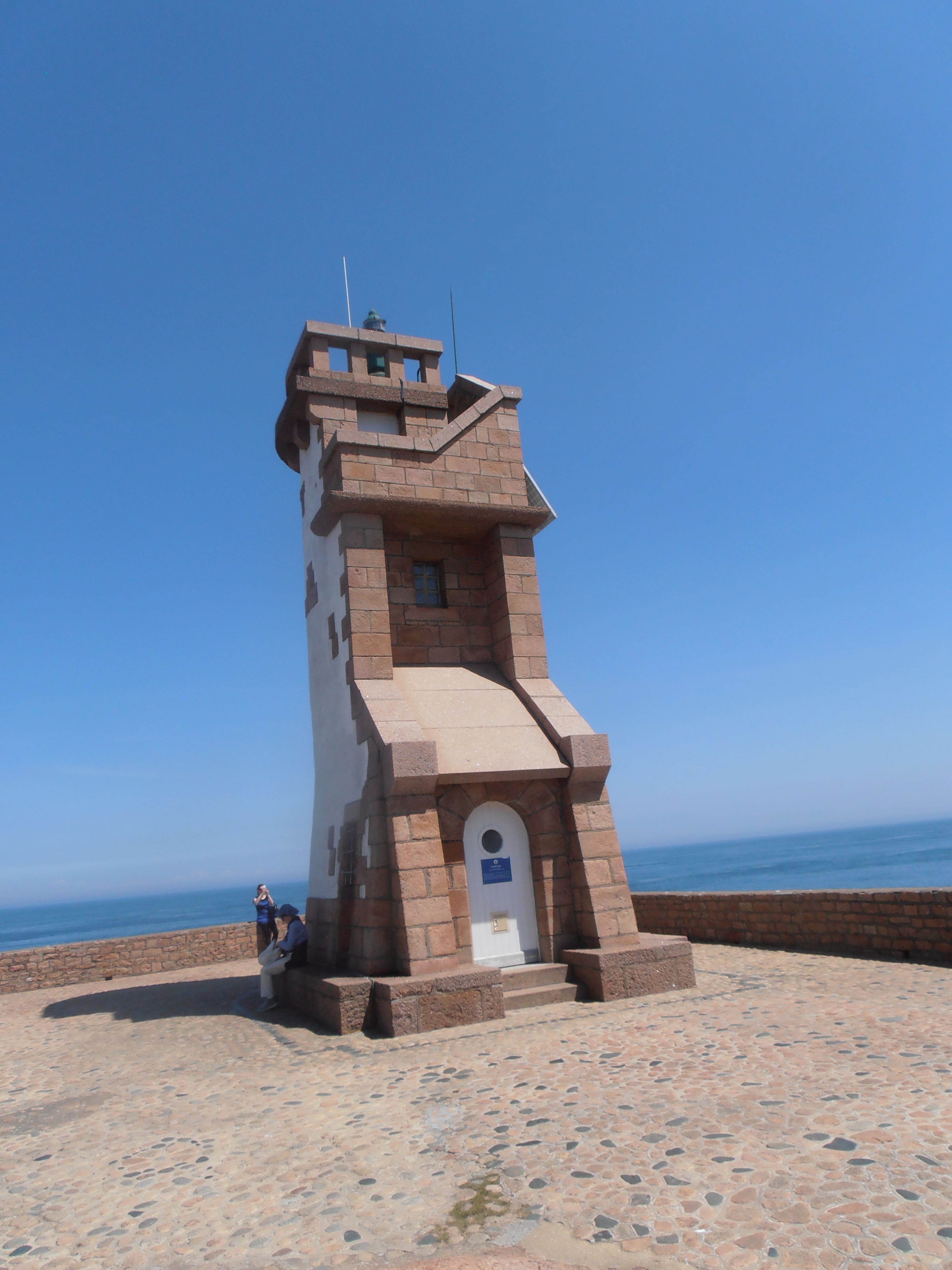 Côtes d'Armor, Île-de-Bréhat, Phare "Feu du Paon" : Feu allumé en 1948, détruit en août 1944 et rallumé en 1948. Equipé d'un feu à occultations à secteurs rouge, vert et blanc d'une portée de 9 milles nautiques. Début 2014, le feu est solarisé, alimenté par générateurs photovoltaïques et équipé d'une source lumineuse à diode électroluminescente. Important pour la navigation : ses secteurs rouge et vert signalent des zones dangereuses constituées de multiples roches isolées parmi de forts courants (source panneau signalétique).